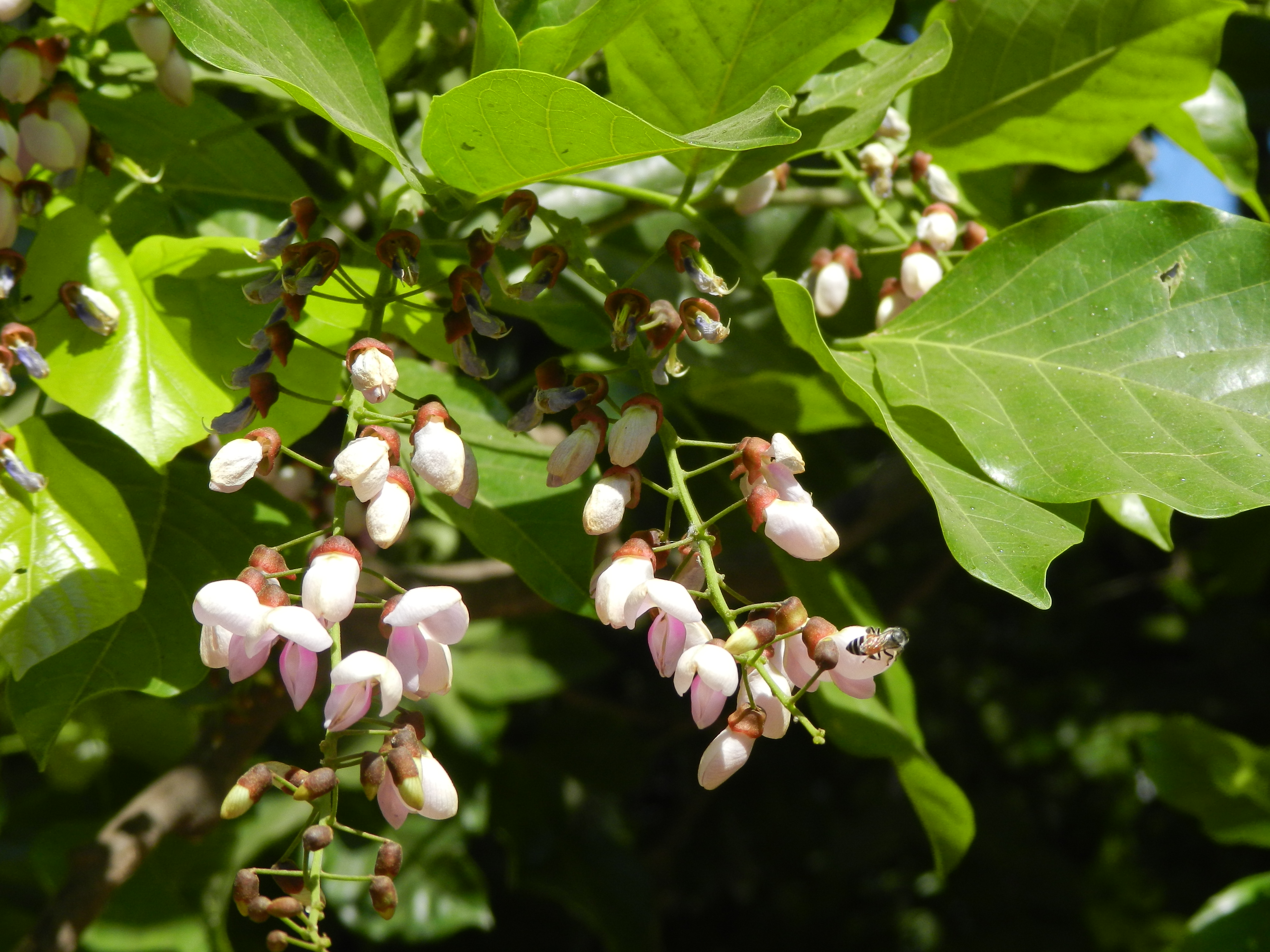 करंजाची फुले